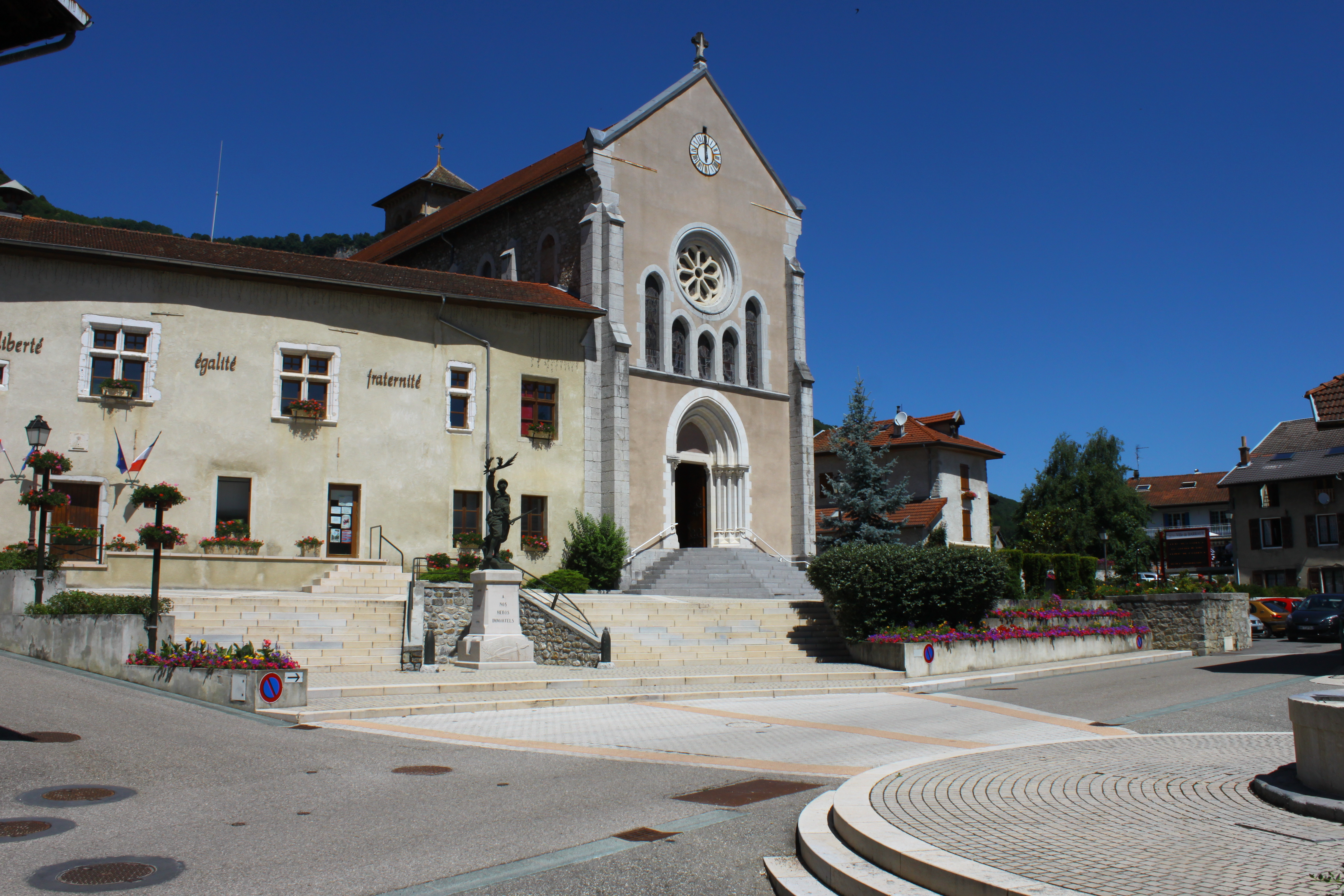 Mairie et église de Barraux